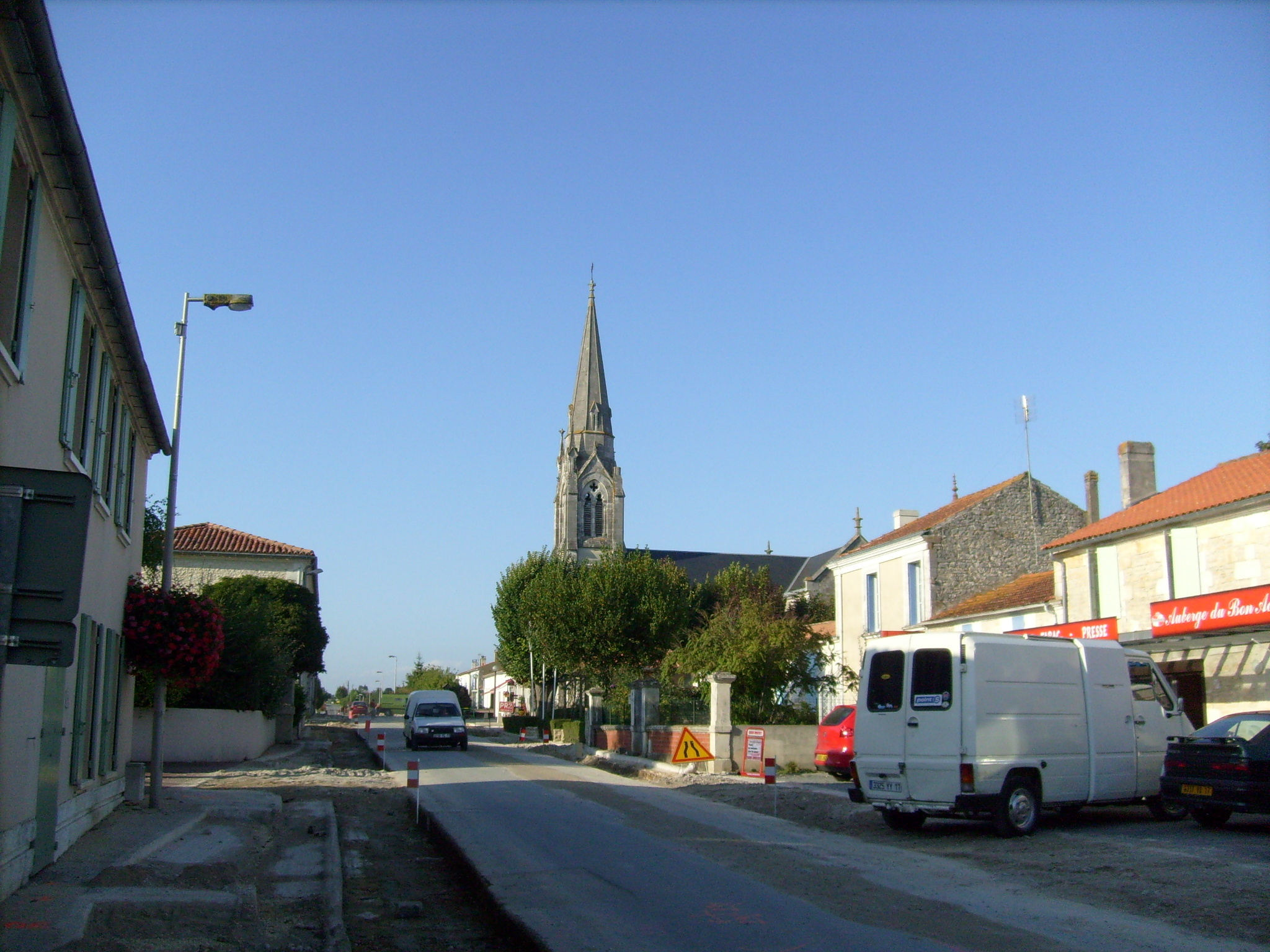 Centre-bourg de Trizay